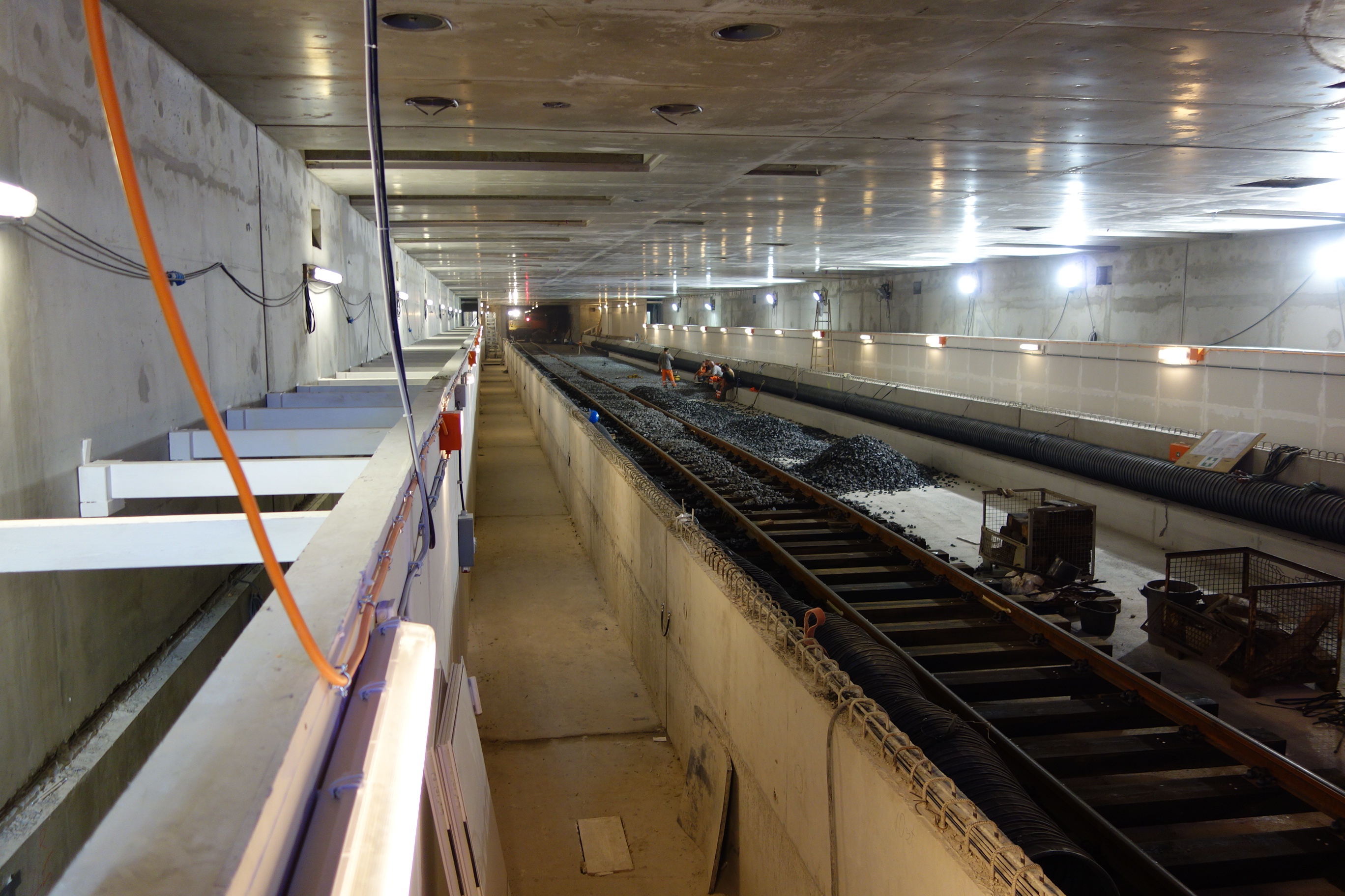 U-Bahnhof Unter den Linden, Berlin, Rohbau des zukünftigen U6-Bahnhofsteils, Blick nach Norden